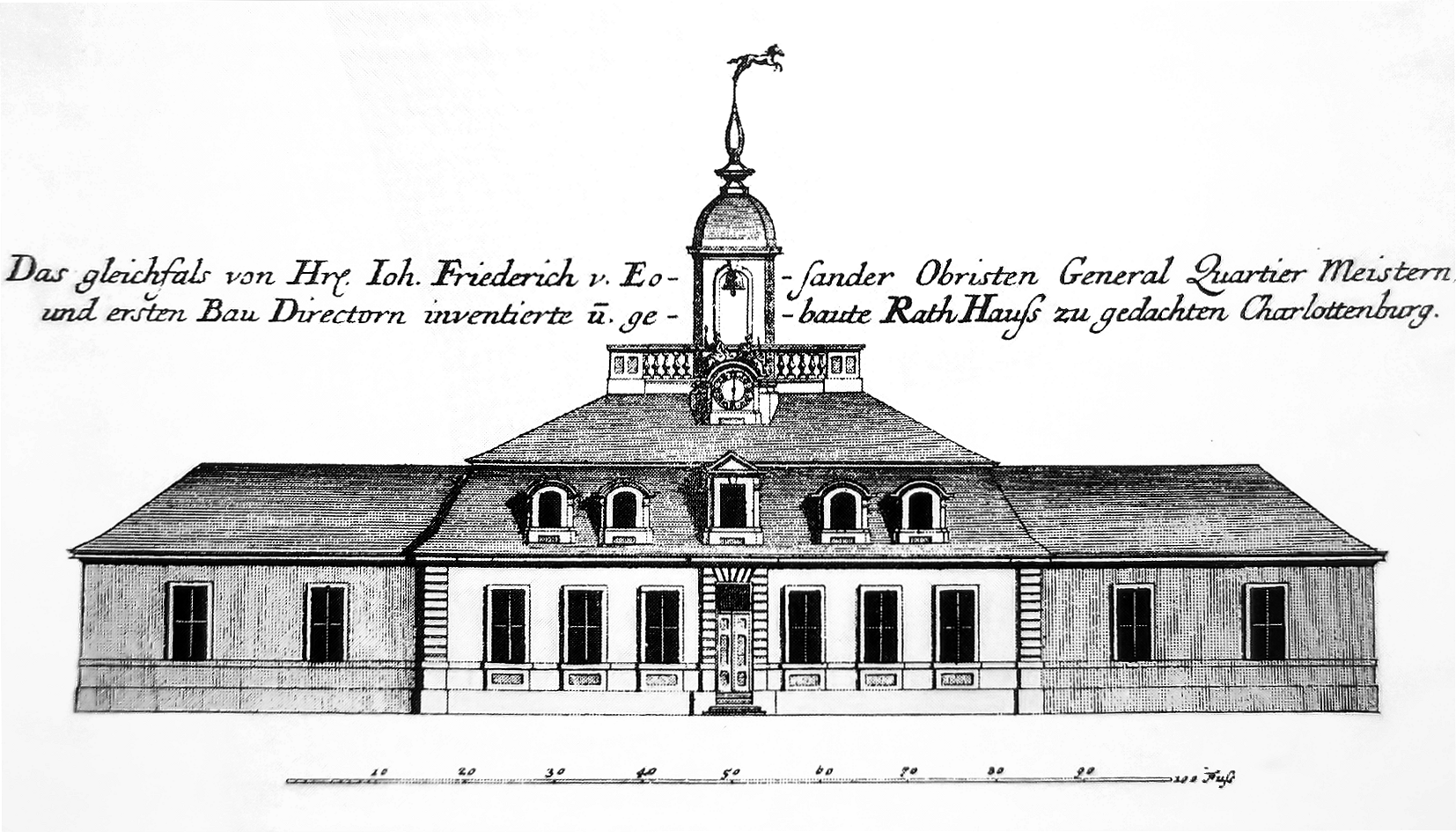 Fotografie einer Skizze des Rathauses Charlottenburg um 1705